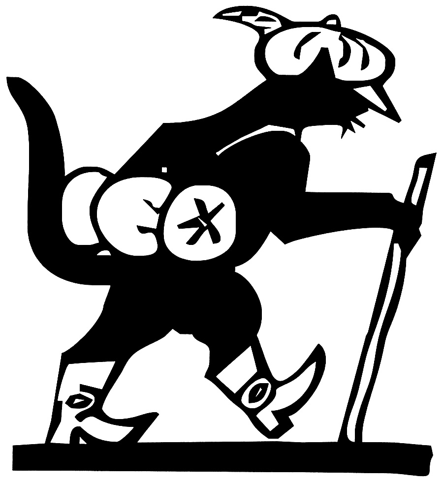 Kocour Mikeš Josefa Lady na směrovce v Říčanech